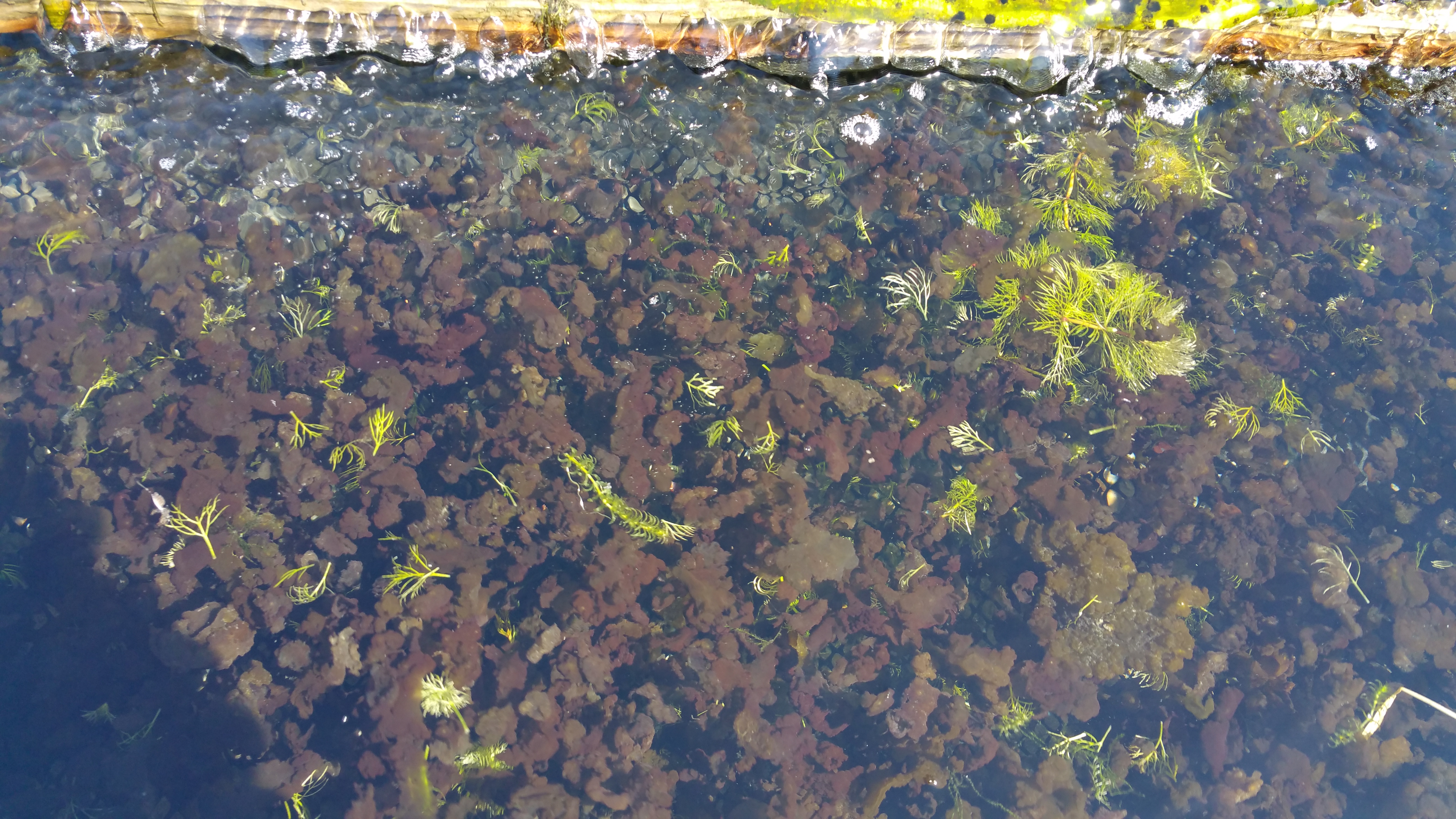 黄金川（福岡県朝倉市）のスイゼンジノリ